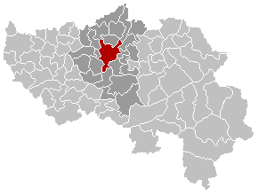 Situation de la ville de Liège dans l'arrondissement de Liège et la province de Liège